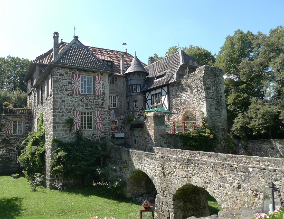 Burg Lede in Vilich